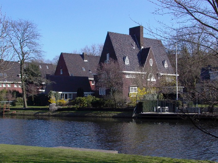 Foto gemaakt door Daniel van der Ree